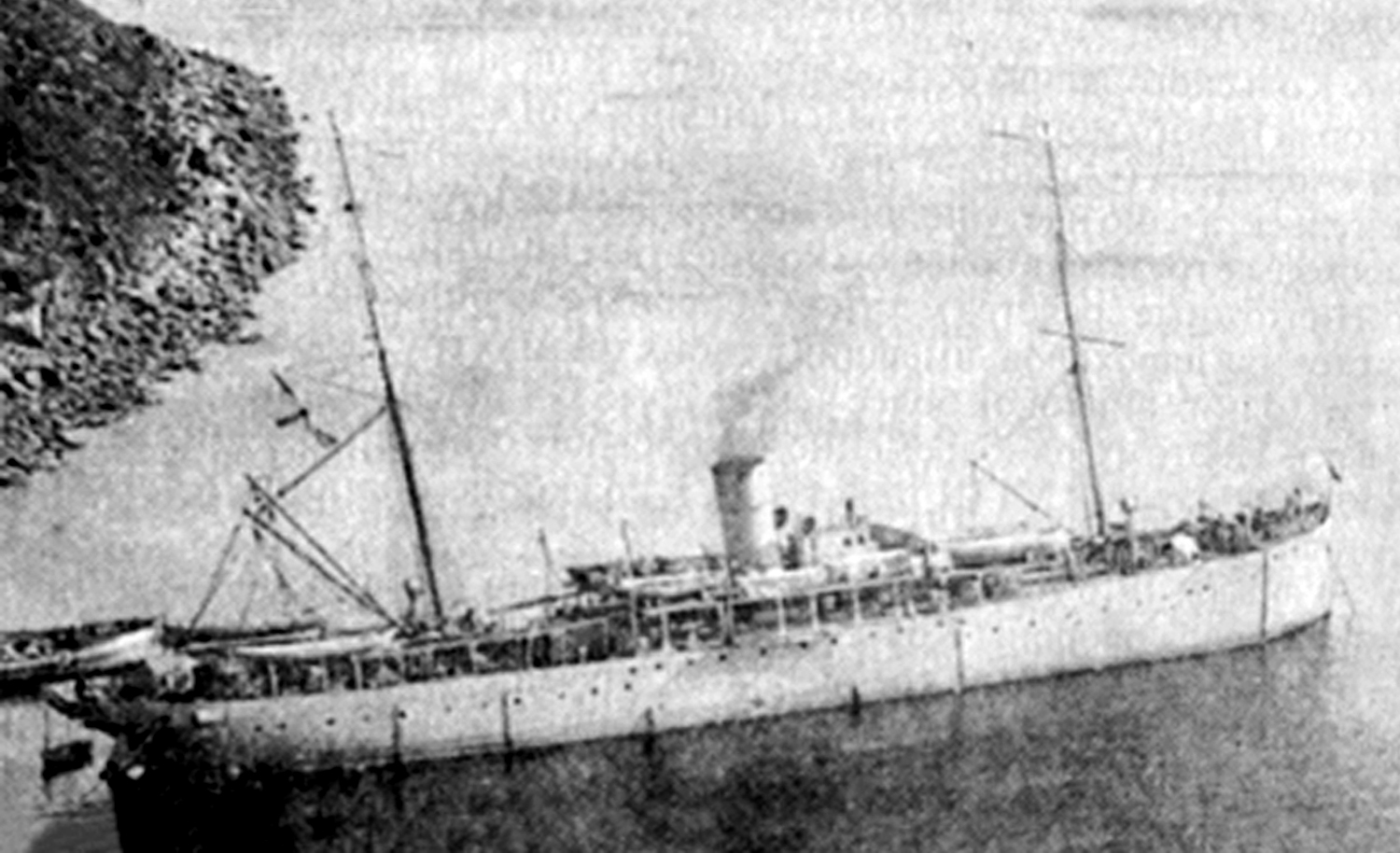 Минный заградитель "Уссури"